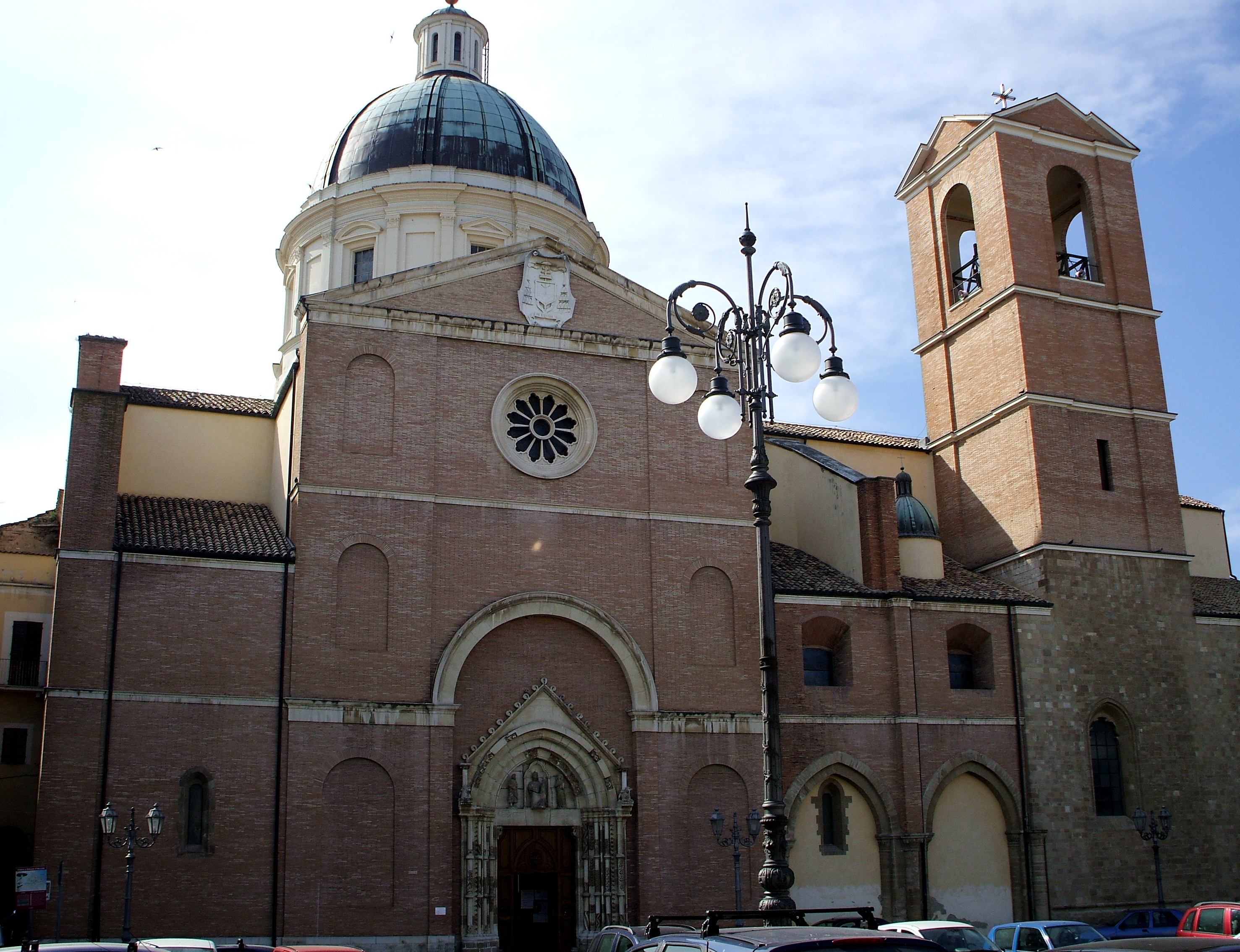 Foto della Basilica di San Tommaso Apostolo - Ortona (CH)